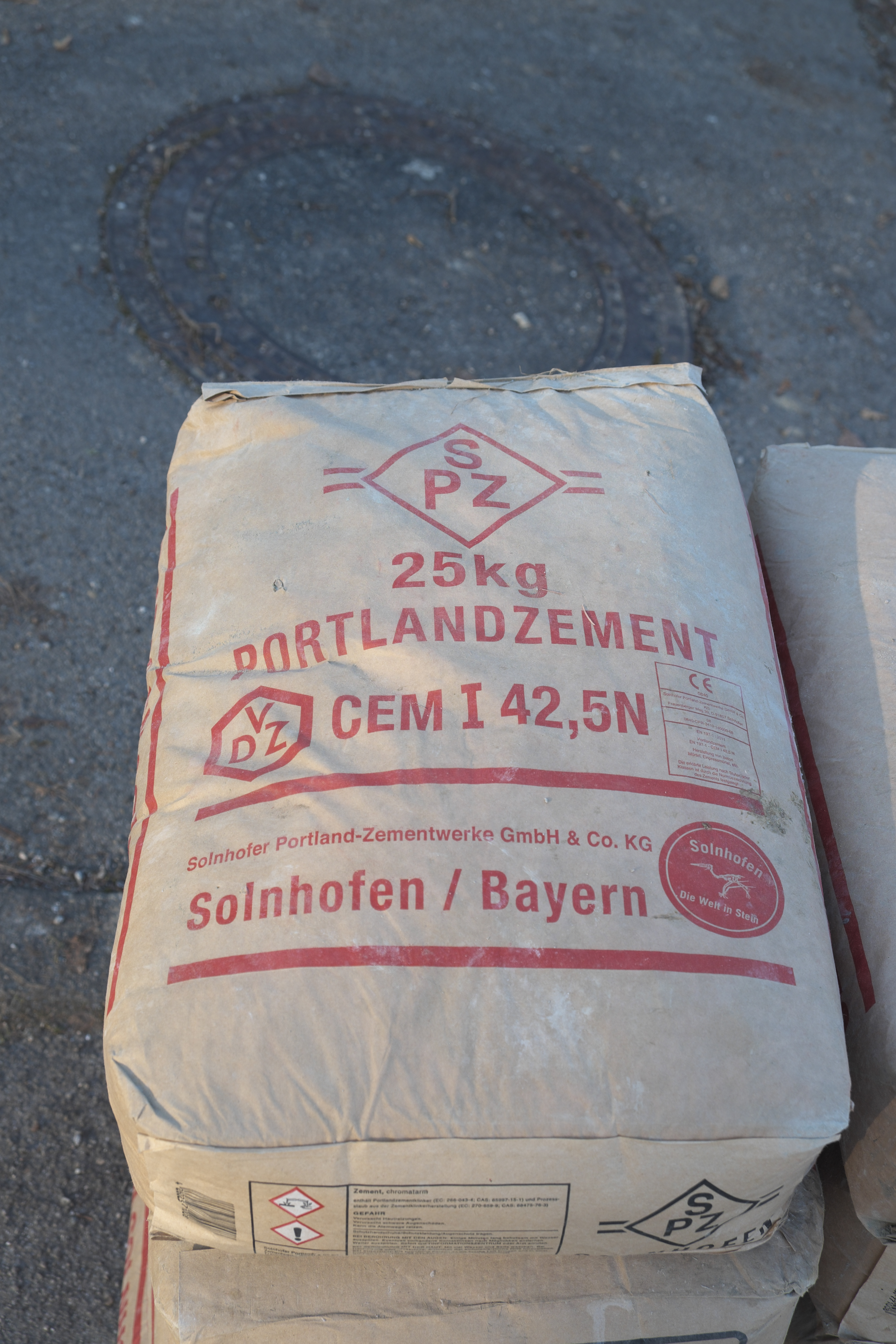 Solnhofer Portland-Zement aus den Solnhofer Portland-Zementwerken in Solnhofen (Bayern/Deutschland)